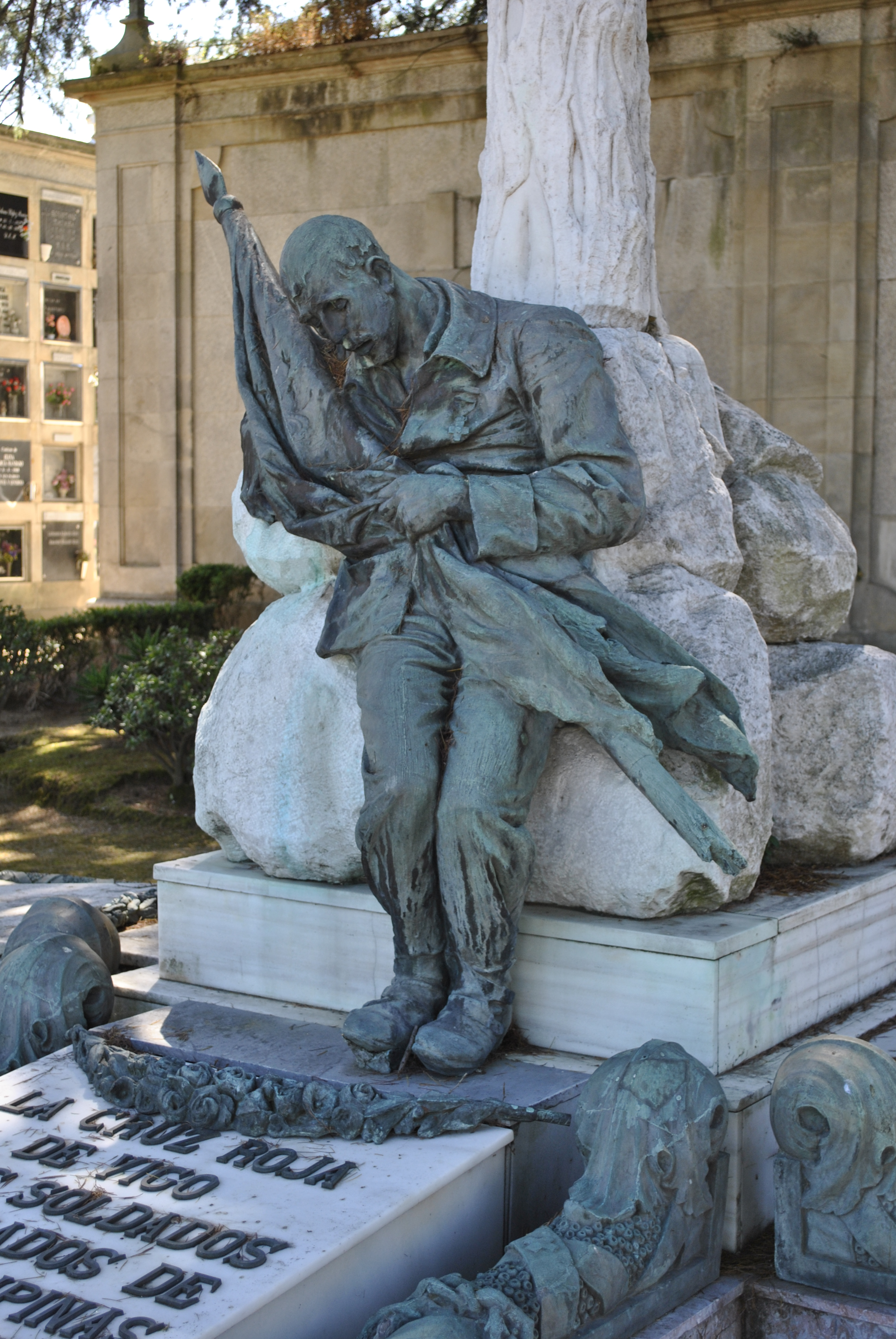 Del escultor Julio Gozález Pola (1865-1929) y el marmolista Juan Baliño Rivas: La Cruz Roja de Vigo a los soldados repatriados de Cuba y Filipinas que fallecieron en esta ciudad 1898.